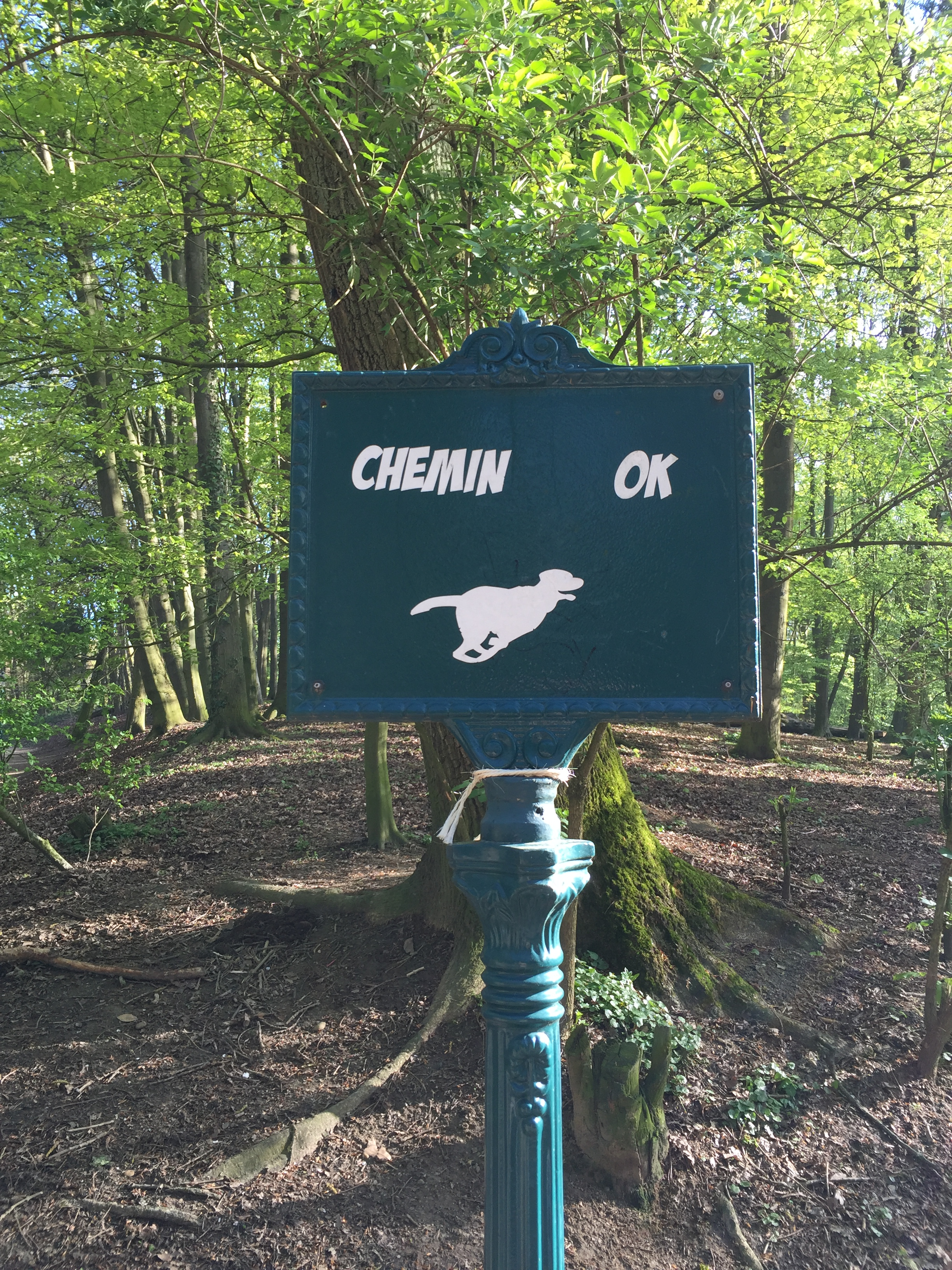 Chemin pour chiens